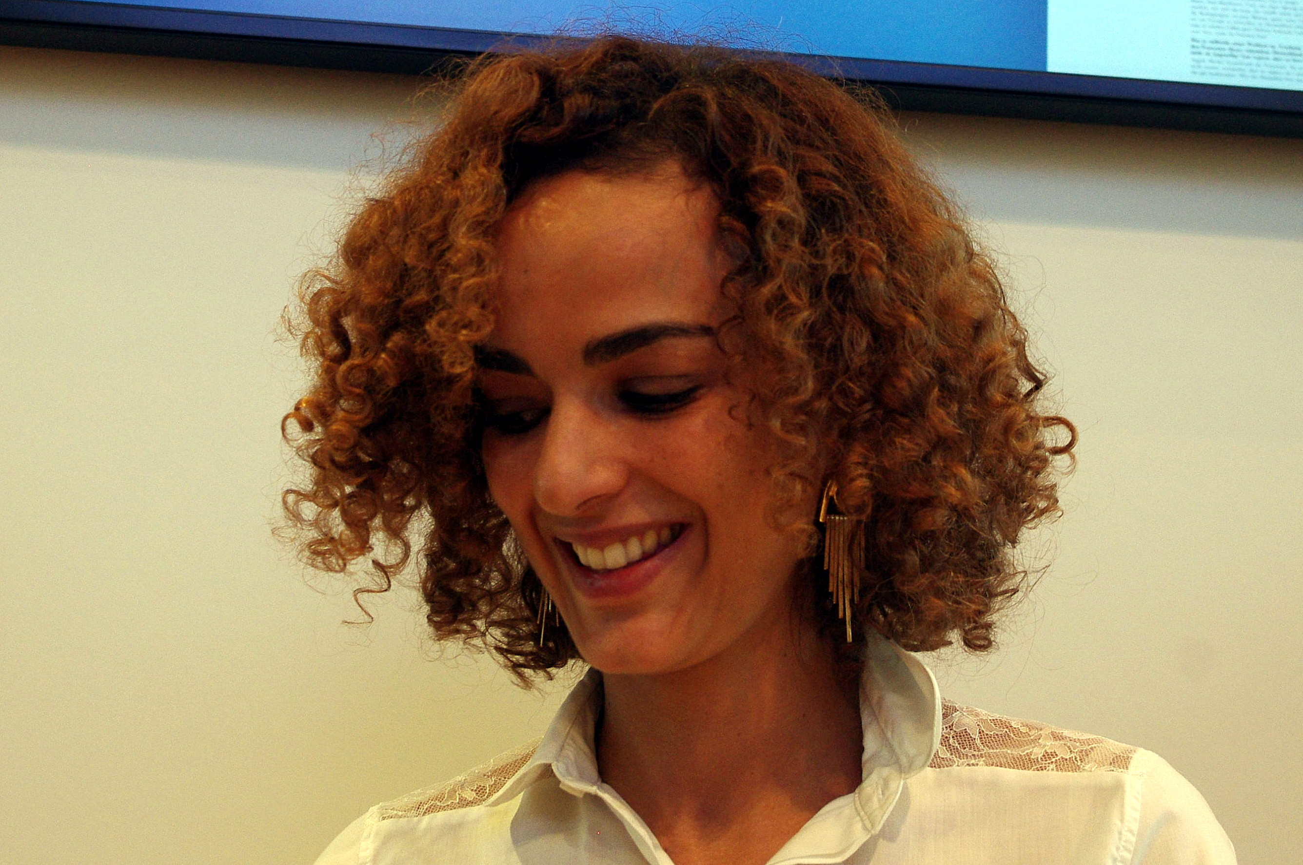 Frankfurter Buchmesse 2017 - Leila Slimani am Stand der Frankfurter Allgemeinen Zeitung.